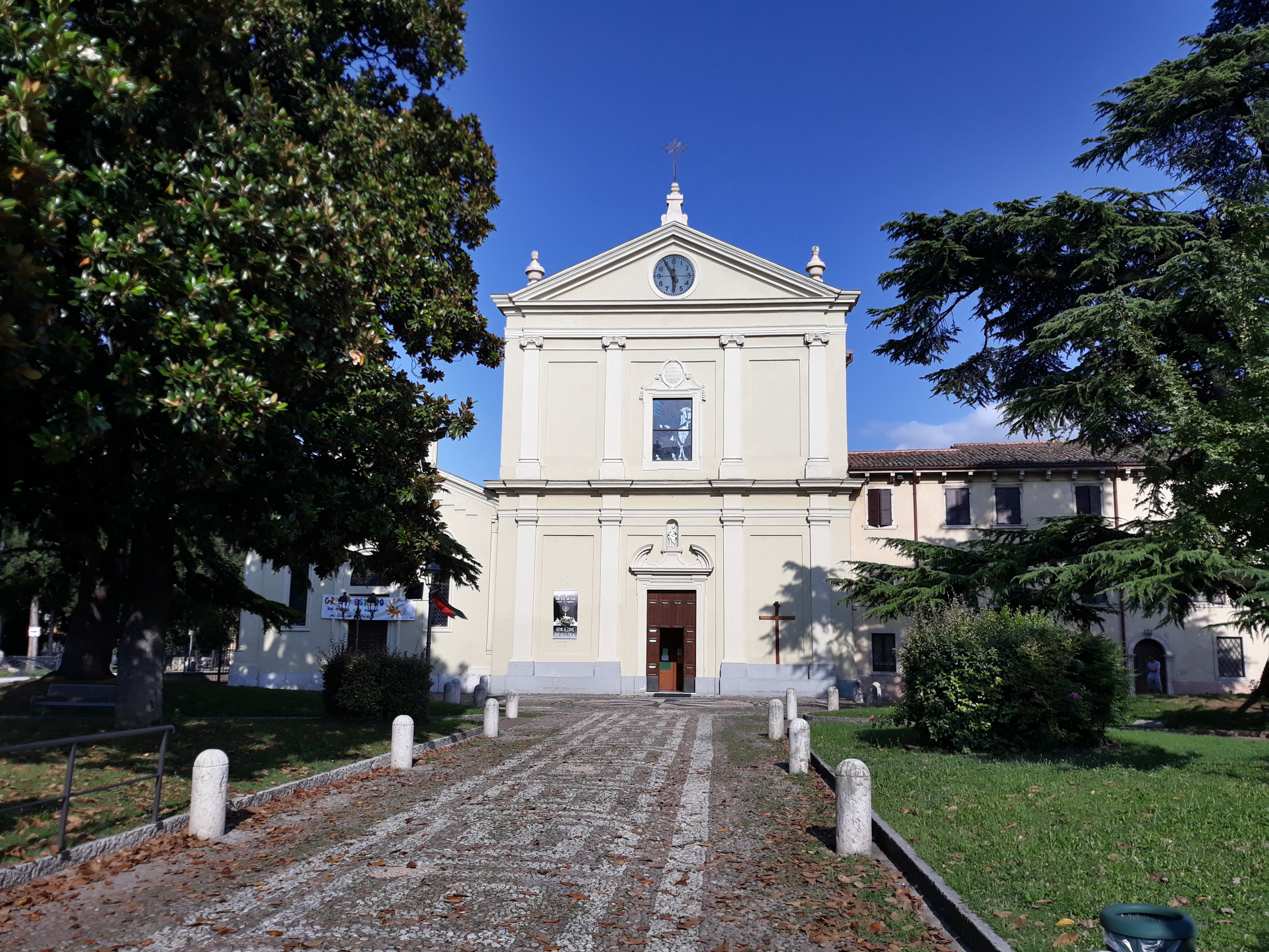 Facciata della chiesa parrocchiale di San Martino Vescovo a San Martino Buon Albergo in provincia di Verona